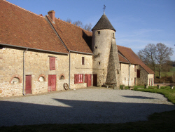 ancien relais de poste de Montmagner (87160 Arnac-la-Poste)